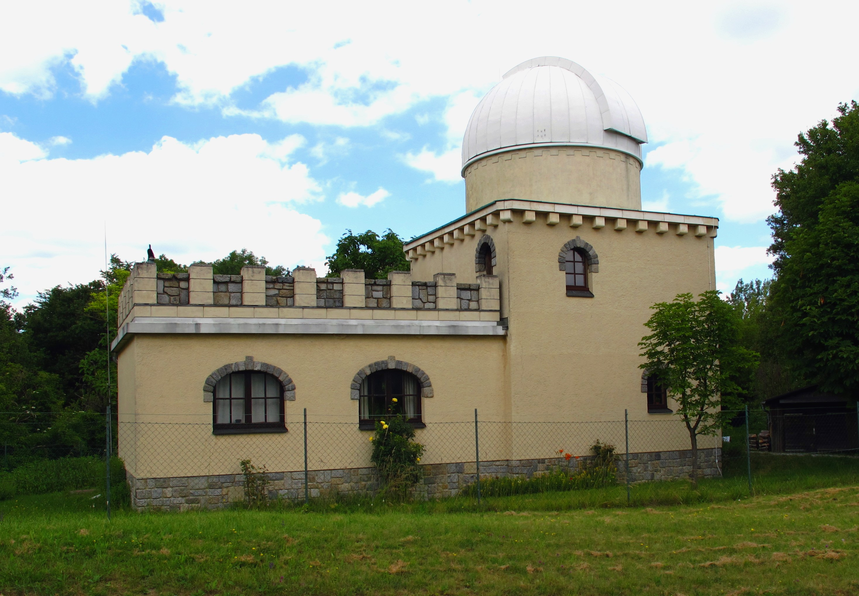 Purgathofer-Sternwarte im Jahr 2014